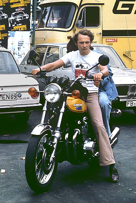 Niki Lauda im Fahrerlager des Nürburgrings